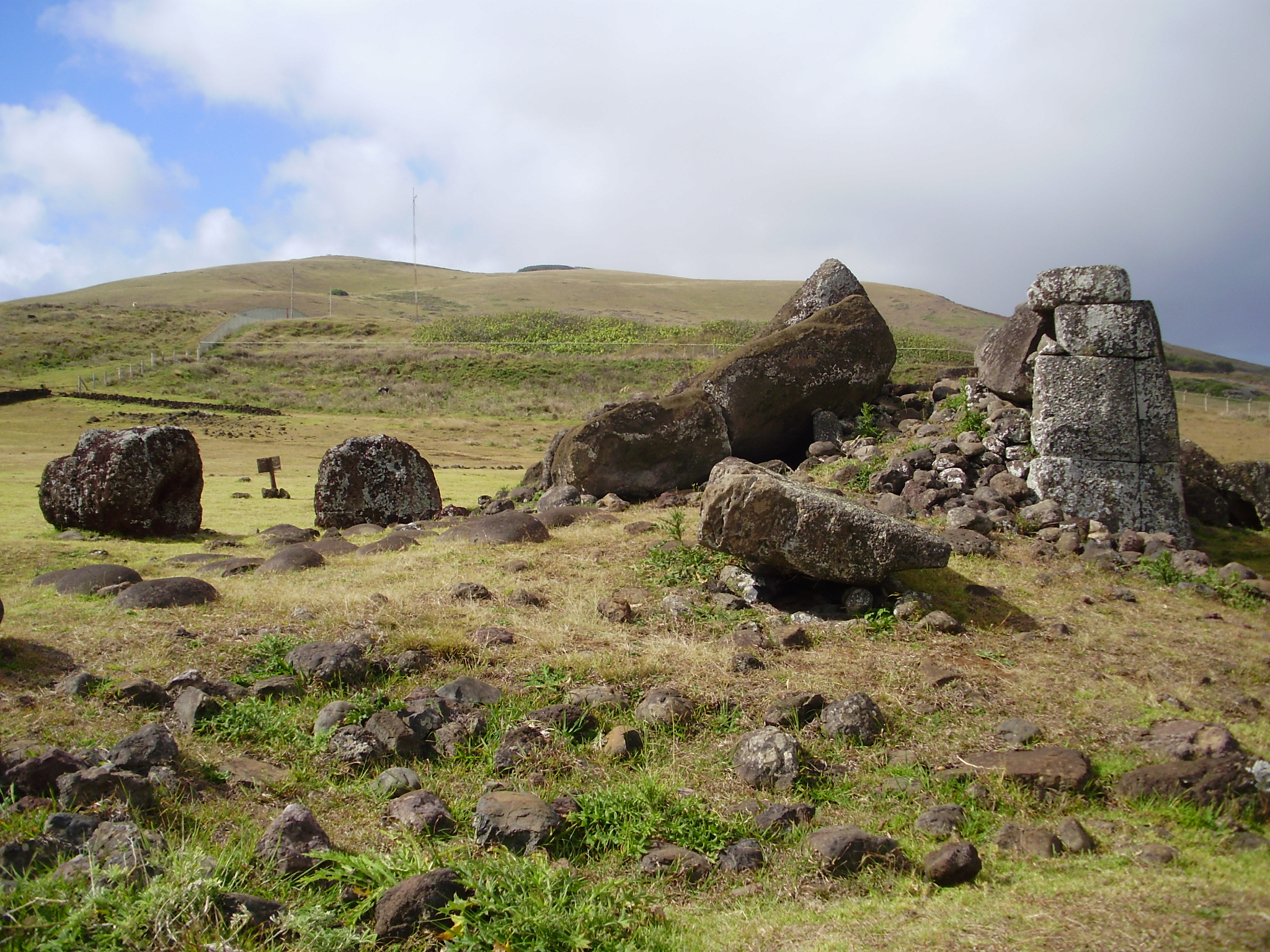 Ahu Vinapu, en Isla de Pascua, Chile.